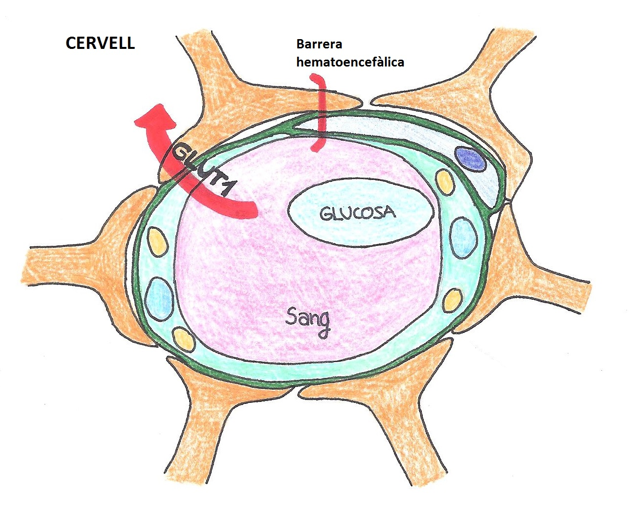 La proteïna GLUT 1 permet l'entrada de glucosa al cervell, travessant la barrera hematoencefàlica. La manca o deficiència d'aquesta proteïna provoca que la glucosa no pugui travessar aquesta barrera i provoca trastorns i malalties.